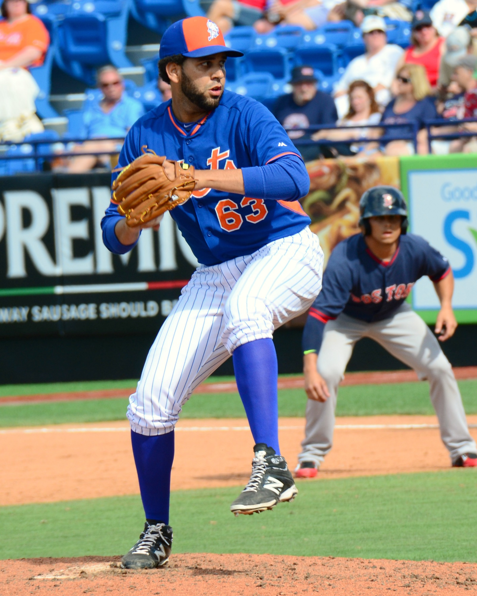 Gabriel Ynoa